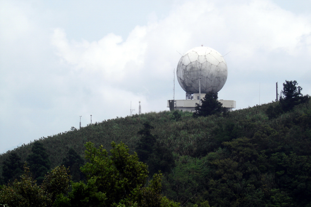 台灣中央氣象局設於五分山的氣象雷達站。